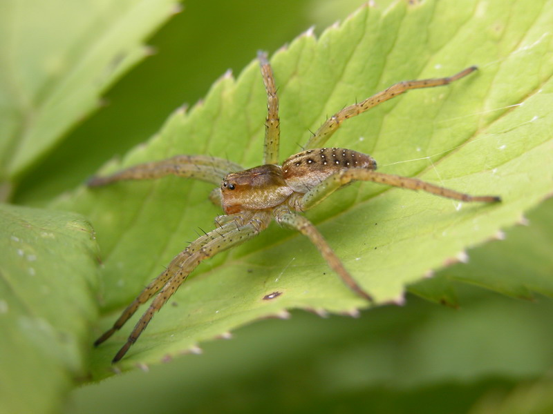 Паук из рода Dolomedes на листе